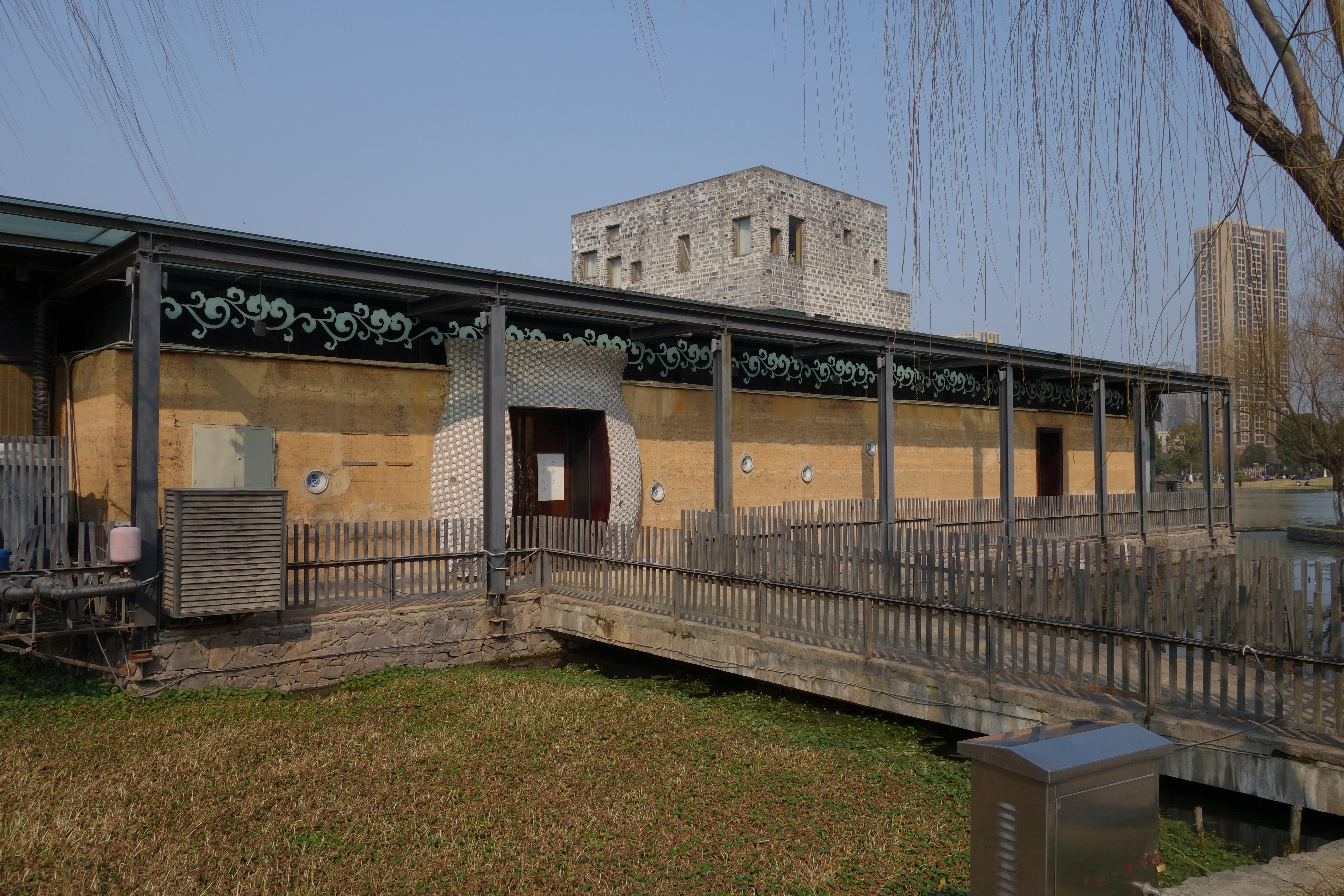 鄞州五散房 - 茶室2